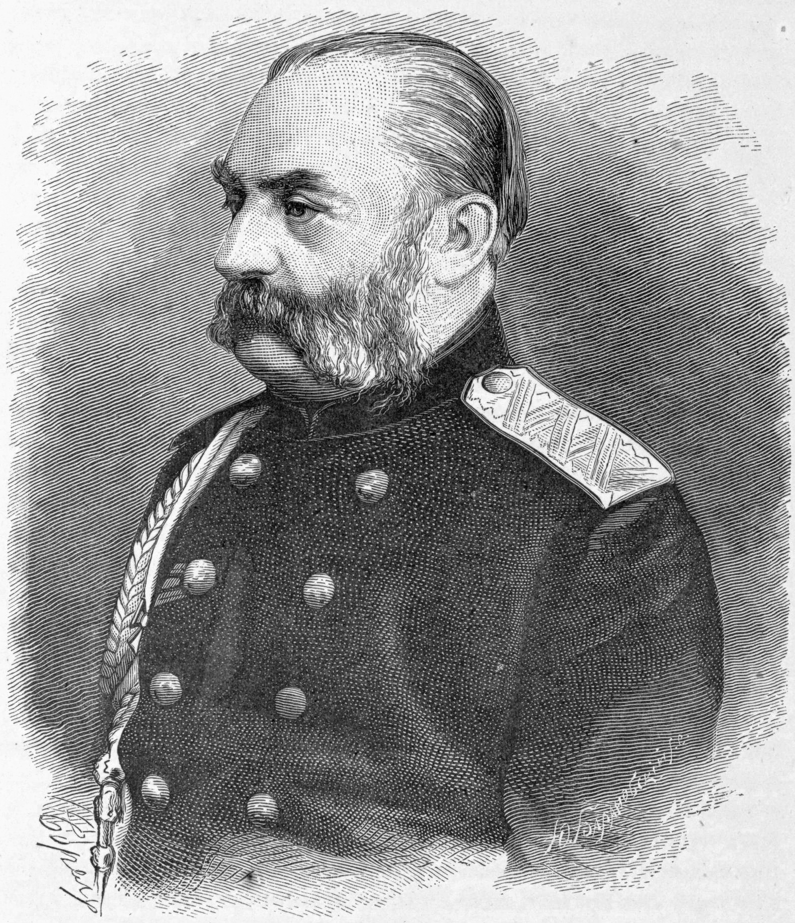 Непокойчицкий, Артур Адамович